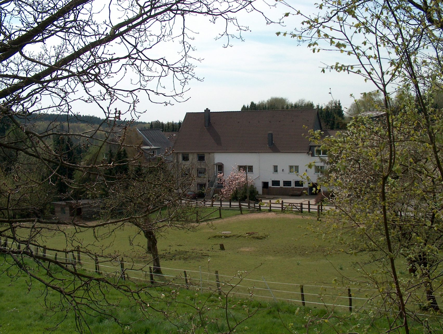 Stadt Radevormwald- Ortschaft Weyer Datum des Fotos: 24.4.2004 Fotograf: Christoph Grimlowski, Radevormwald (Benutzer Grimmi59_rade)